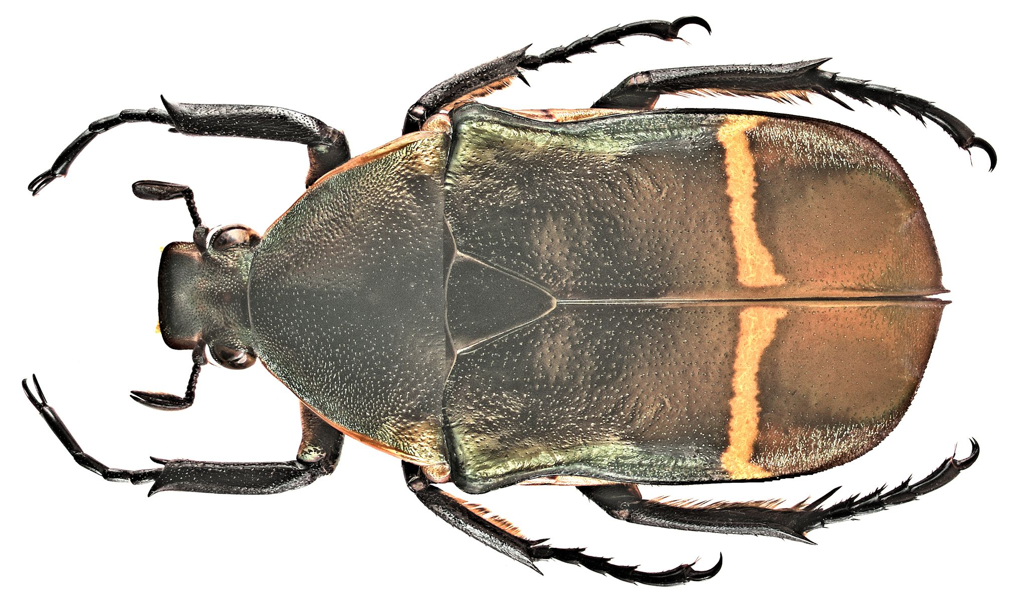 Familie: Scarabaeidae Groesse: 27 mm Verbreitung: Westafrika Fundort: Kamerun, 1998 det. U.Schmidt, 2006 Photo: U.Schmidt, 2006